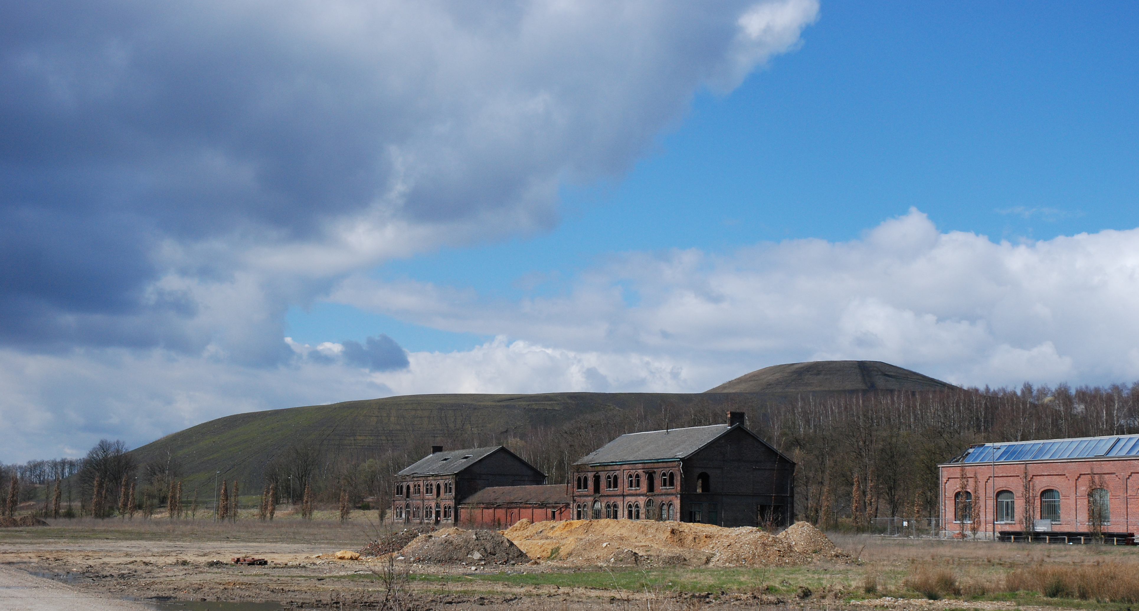 de steenberg van de steenkoolmijn van Winterslag, Genk, België